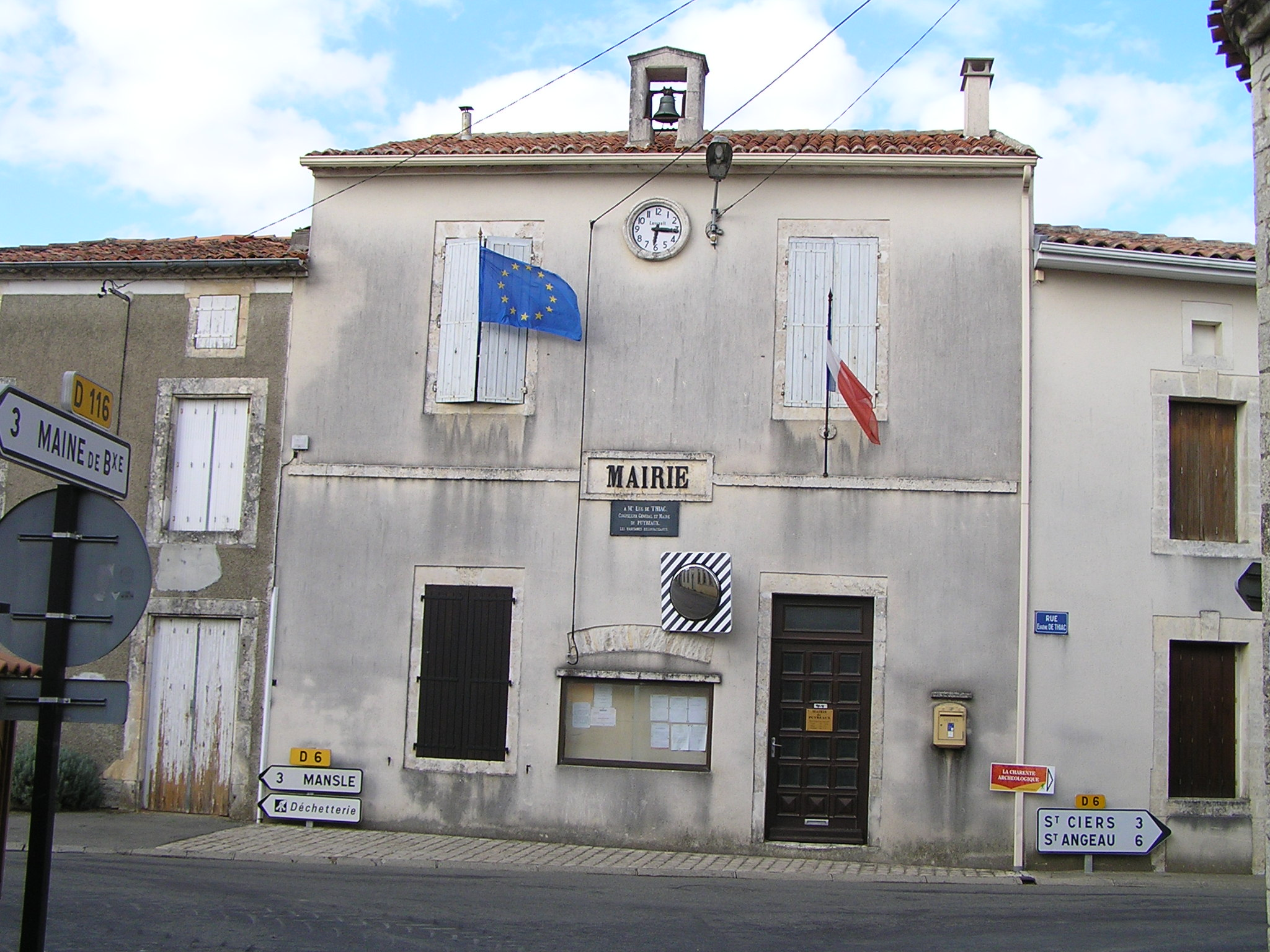 mairie de Puyreaux